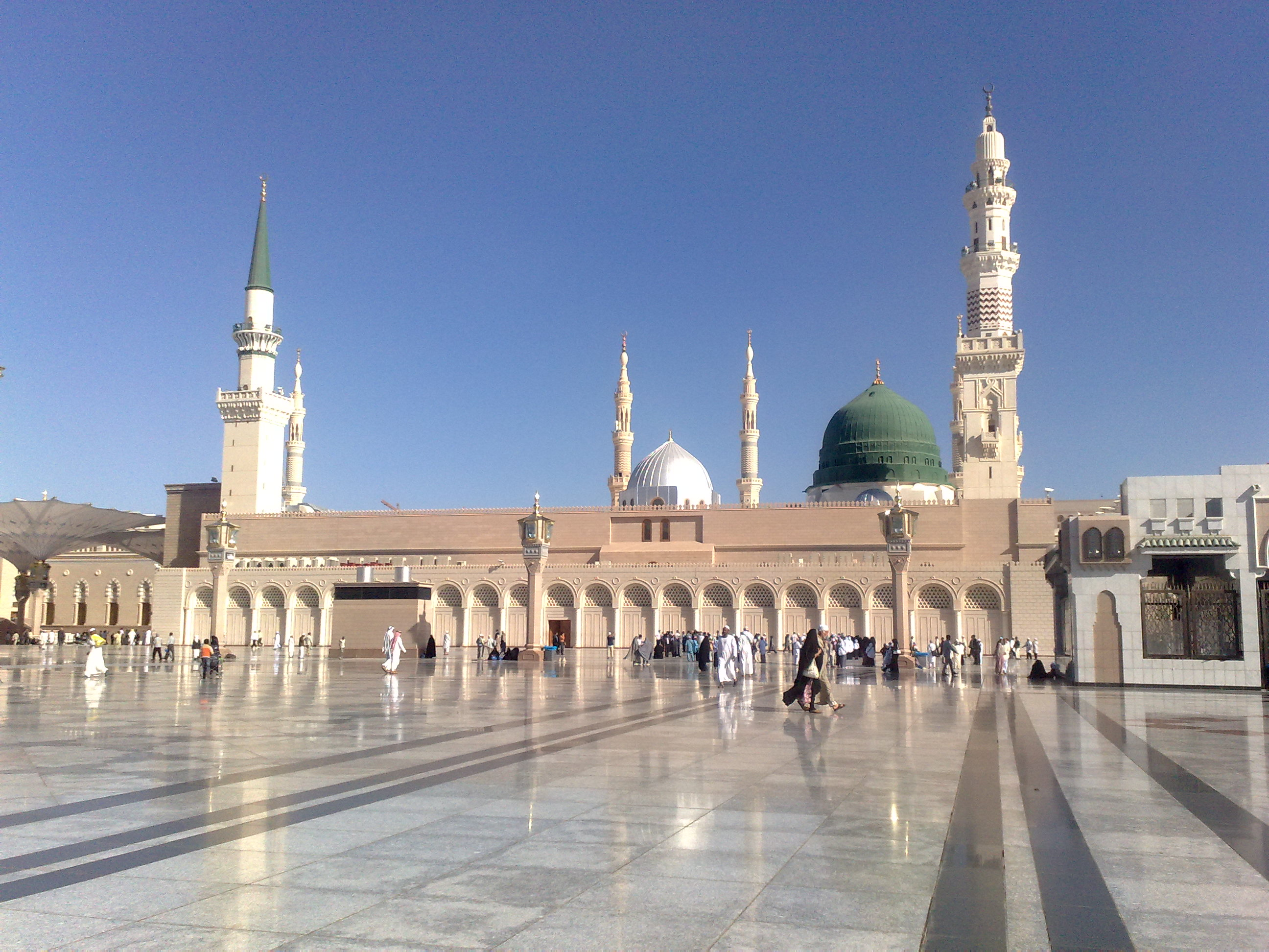 Gumbat Khizra, Masjid Nabvi, Madina Munawara